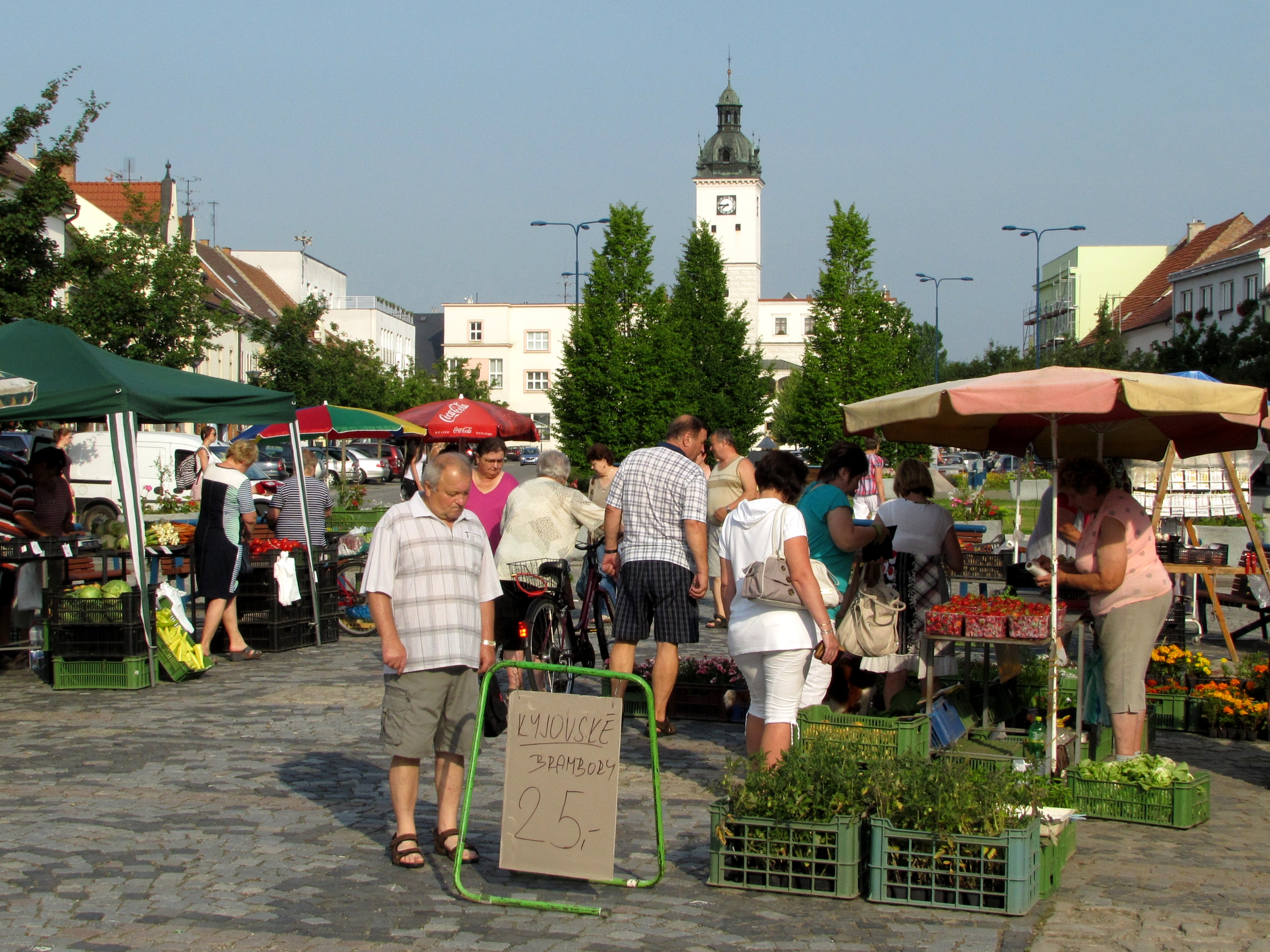 Ranní trh na Masarykově náměstí v Kyjově